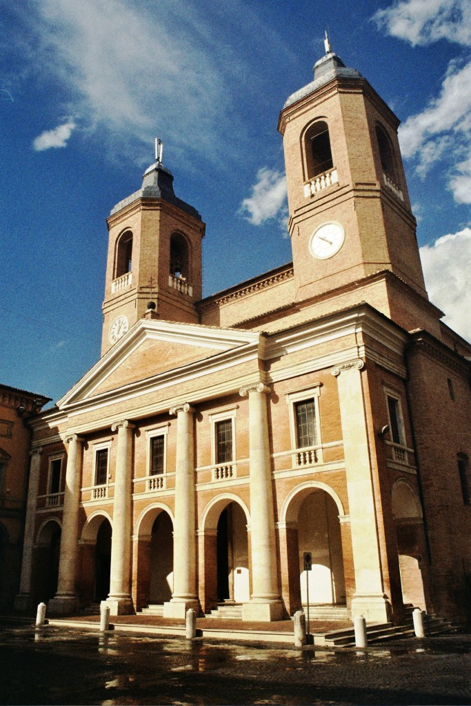 La chiesa di Santa Maria Annunziata è la chiesa principale di Camerino, e cattedrale dell’arcidiocesi di Camerino-San Severino Marche. Dal 1970 è insignita anche del titolo di Basilica minore. This is a photo of a monument which is part of cultural heritage of Italy.